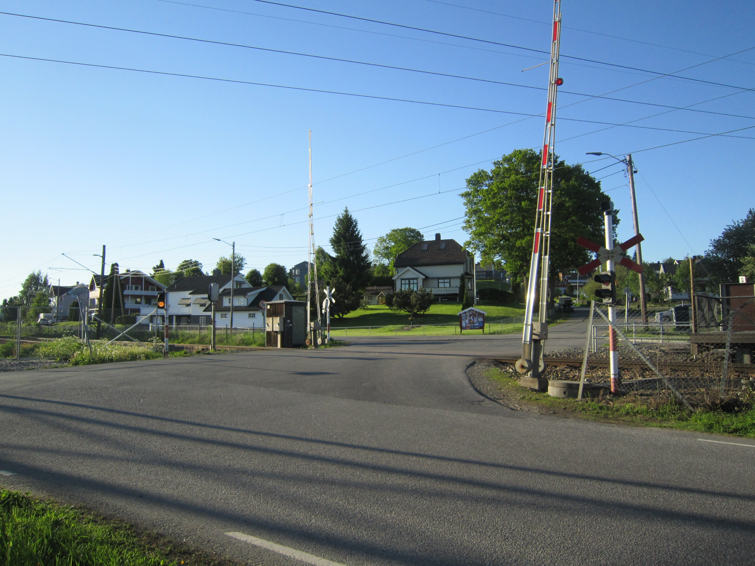 Fylkesvei 279 krysser Kongsvingerbanen ved Nerdrum holdeplass